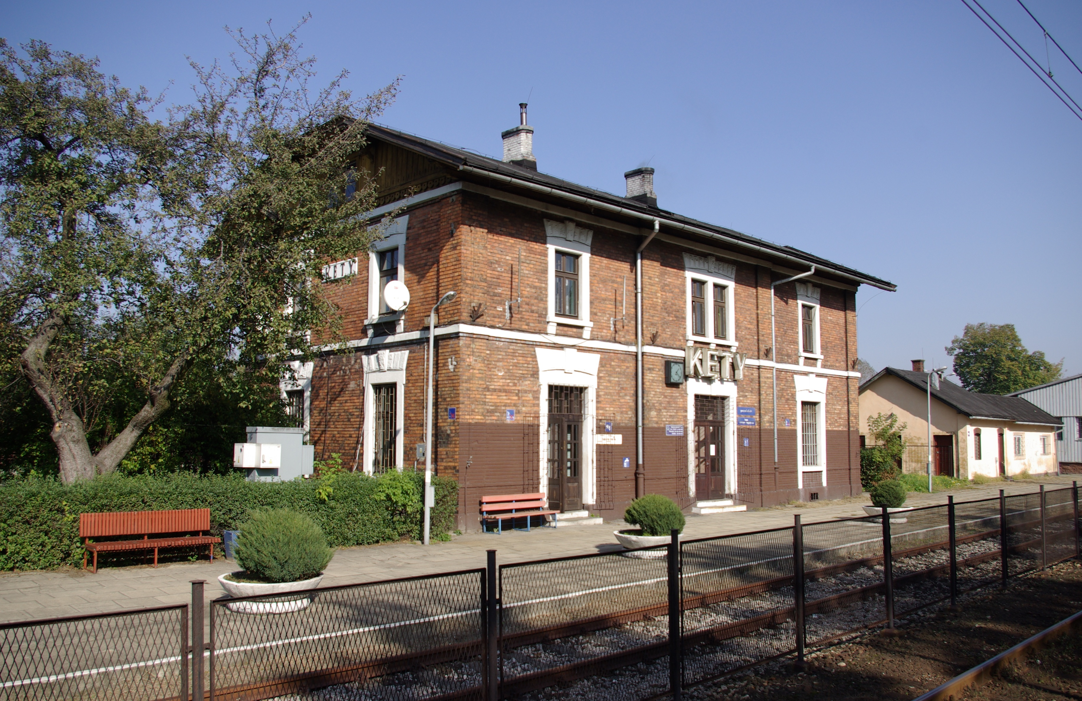 Kęty (stacja kolejowa)